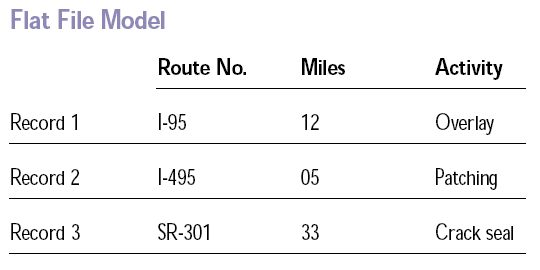 Монгол: Зураг1- Flat File Model